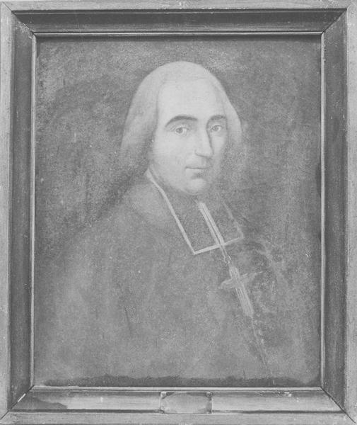 Portrait de Jean-Marc de Royère, conservé à la cathédrale française de Tréguier (Côte-d'Armor) et classé au titre d'objet le 24 janvier 1979